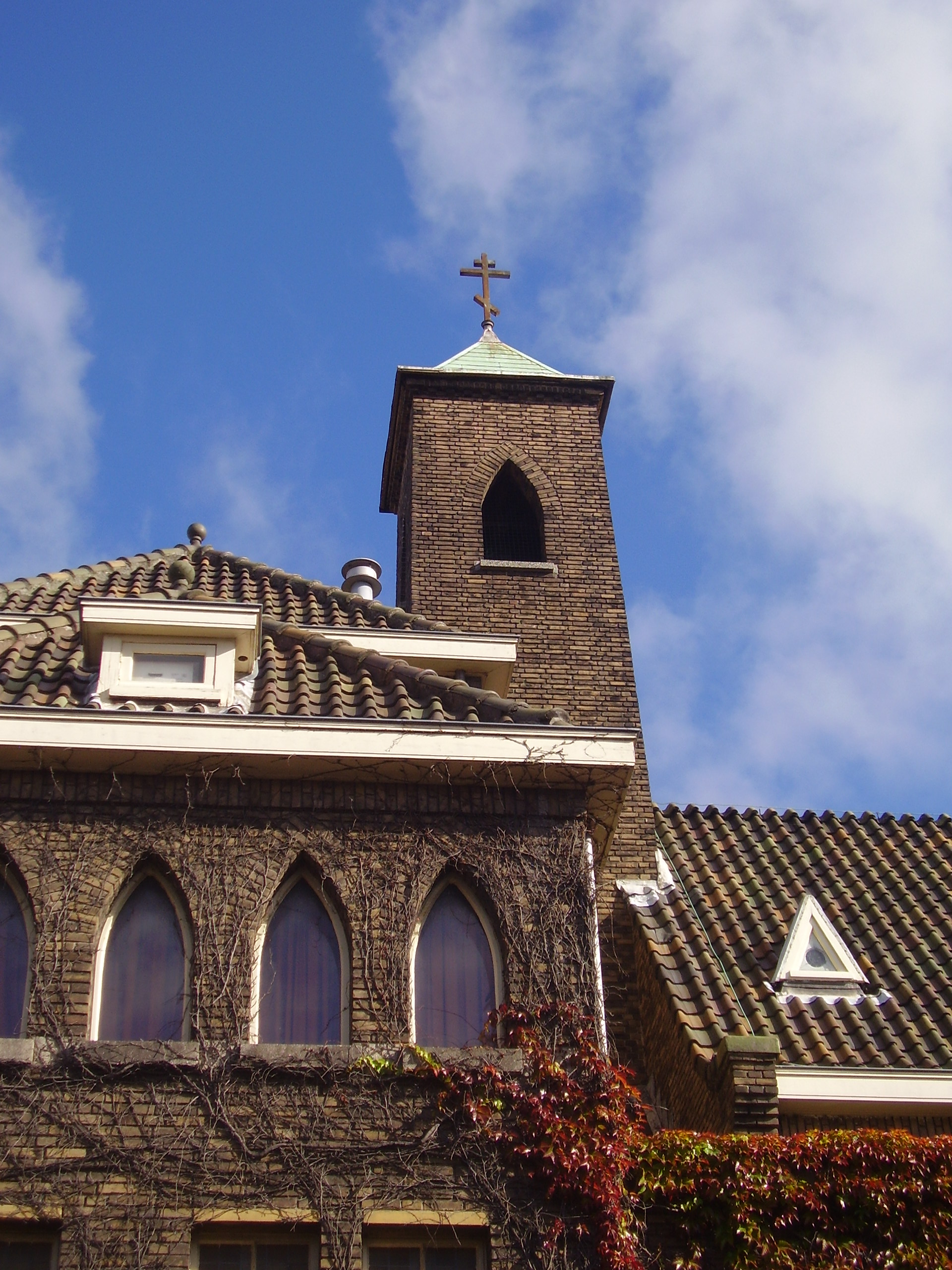 Архимандрит Роберт Тафт в храме св. Антония при Руссикуме